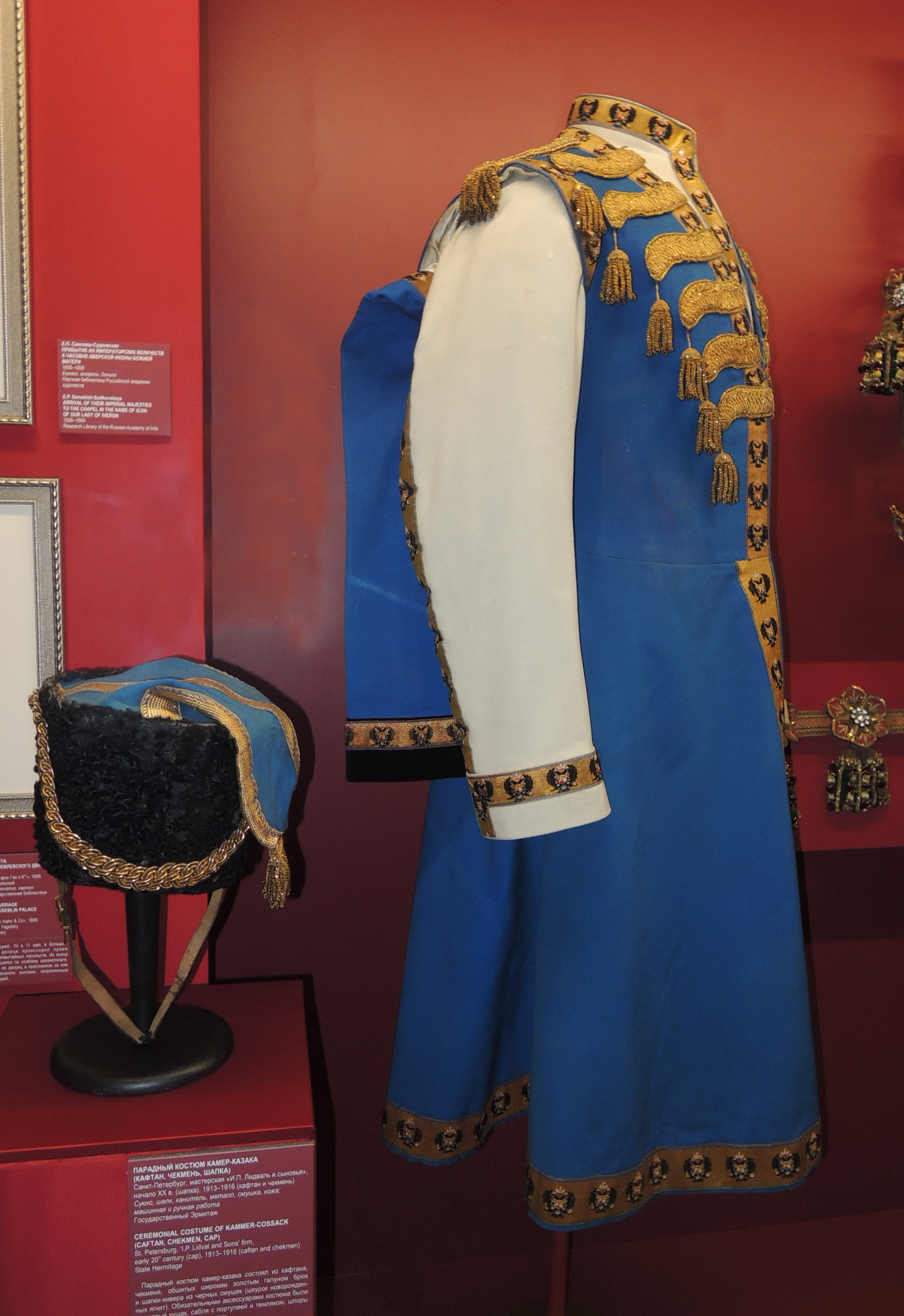 Парадный костюм камер-казака (кафтан, чекмень, шапка). Санкт-Петербург, мастерская "И.П. Лидваль и сыновья", нач. ХХ века (шапка), 1913-1916 (кафтан и чекмень). Сукно, шелк, канитель, металл, смушка, кожа; машинная и ручная работа. Государственный Эрмитаж. ИНВ №ЗУП-1422, ЗУП-1424, ЭРТ-12638. Парадный костюм камер-казака состоял из кафтана, чекменя, обшитых широким золотым галуном брюк и шапки-кивера из черных смушек (шкурок новорожденных ягнят). Обязательным акссессуаром костюма были шелковый кушак, сабля и портупеей и темляком, шпоры и белые замшевые перчатки. Кафтан из синего сукна на шелковой синей подкладке с застежкой на крючках, отрезной по талии, со складками сзади, рукава разрезные от плеча. По бортам, подолу, рукавам и спинке выложен золотой гербовый галун; полочка украшена рядами брандербуров. Чекмень из белого сукна на белой шелковой подкладке с застежкой на крючках, отрезной по талии, со складками сзади, с воротником-стойкой. По бортам, подолу, воротнику, и рукавам выложен золотой гербовый галун. На подкладке рукава чекменя надпись химическим карандашом - "Поляковъ". Кафтан и чекмень принадлежали камер-казаку вдовствующей императрицы Марии Федоровны - Кириллу Ивановичу Полякову, находившемуся с 14 февраля 1913 года при ней в качестве телохранителя. Вместе со вторым камер-казаком Тимофеем Ящиком, он выехал в Данию в 1919 году, где служил при императрице до самой её кончины.